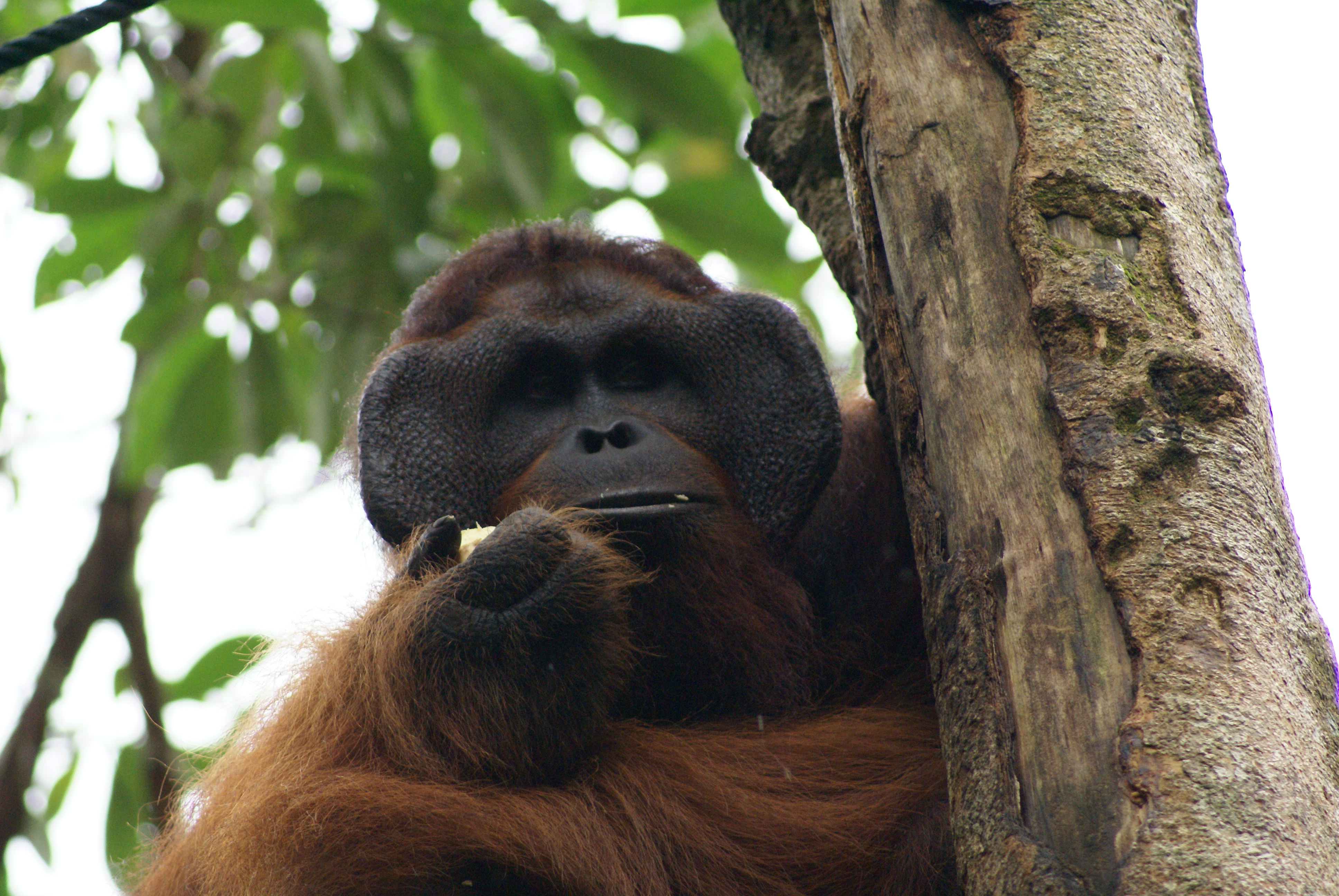 Pongo pygmaeus